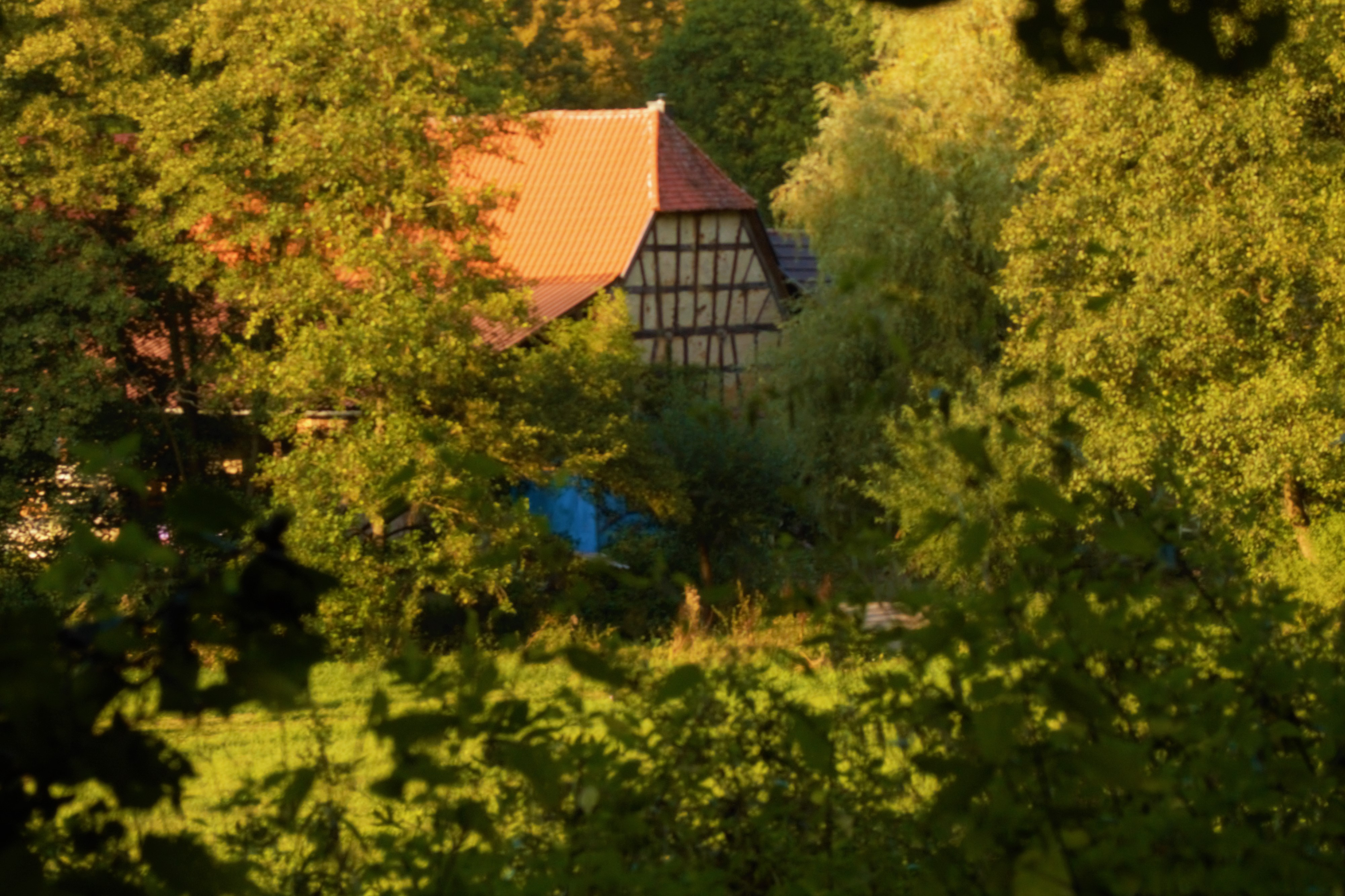 Hessenmühle